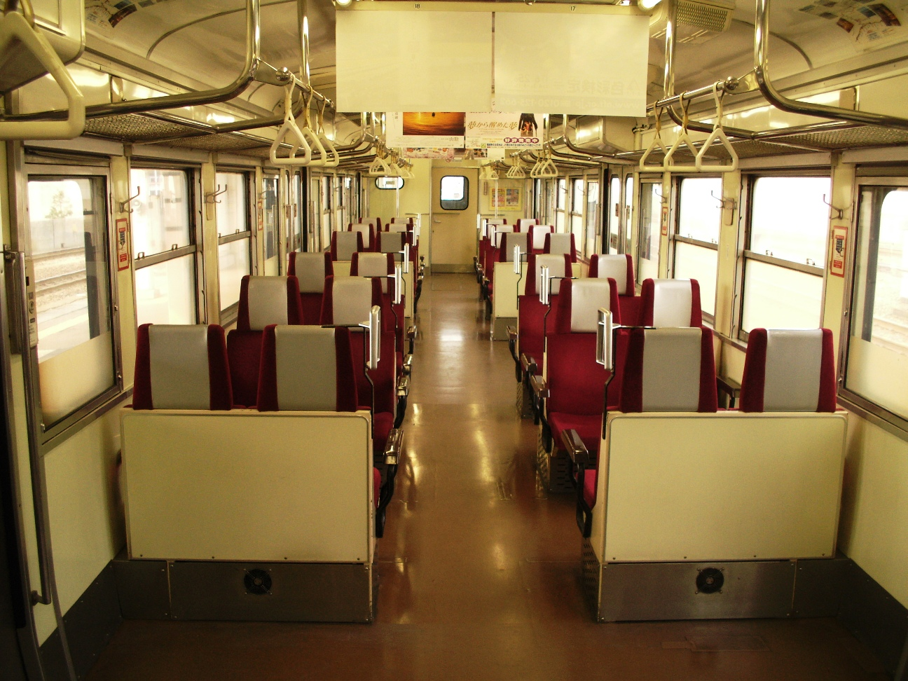 JR西日本415系電車 車内(金沢駅にて)